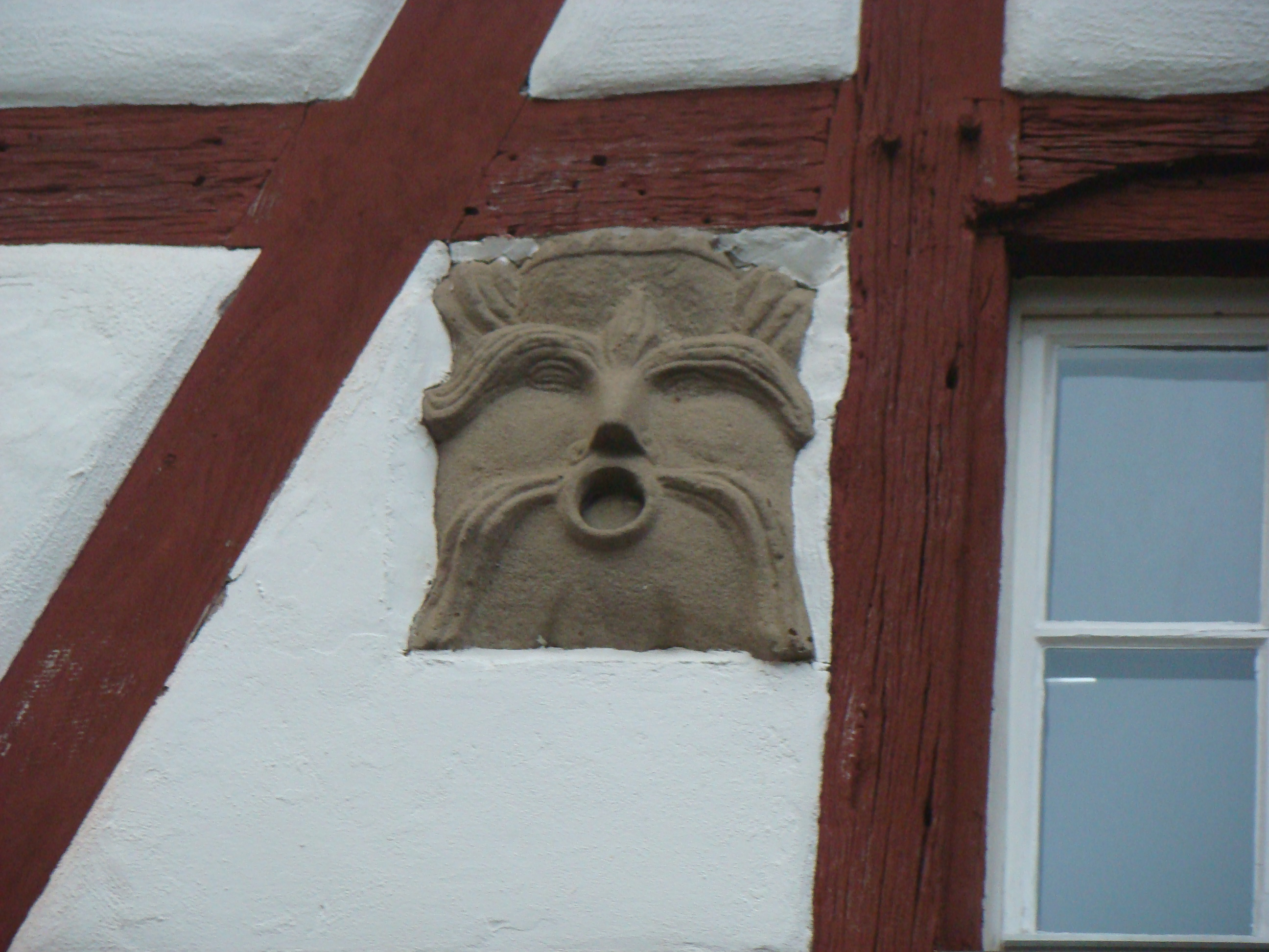 Fassadendetail der Zehntscheuer beim Rentamt in Gemmingen